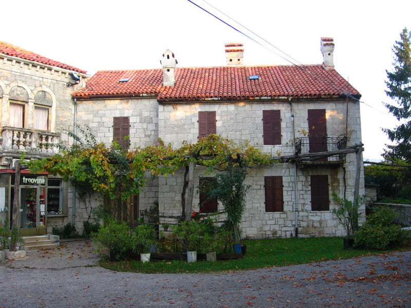 Temnica